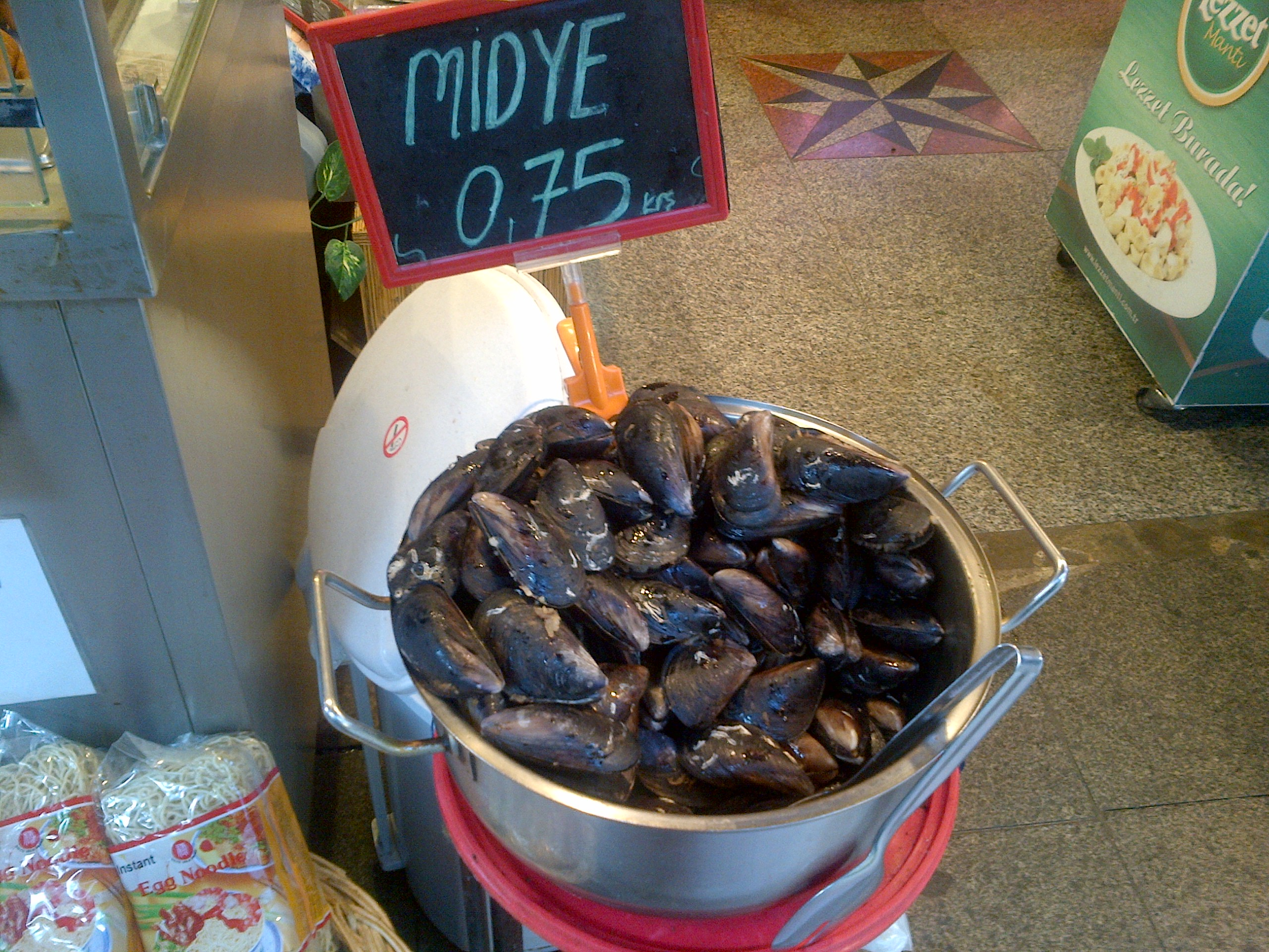 Midye dolma, cholgas rellenas con pilav, arroz al estilo turco.